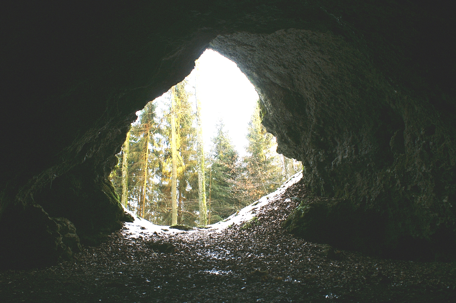 Das Steinerne Haus bei Westerheim ist eine Höhle vom Typ Eiskeller